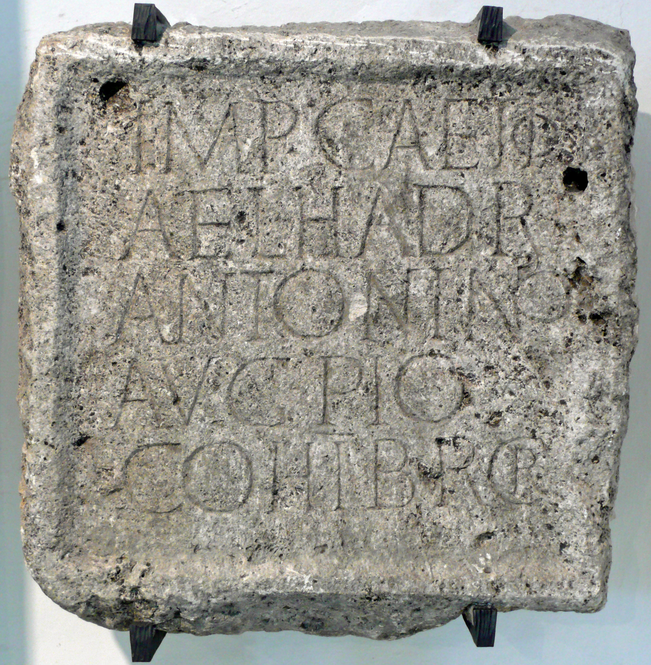 CIL 011930 IMP(eratori) CAE(sari) TITO AEL(io) HADR(riano) ANTONINO AUG(usto) PIO COH(ors) I BR(eucorum) C(ivium) R(omanorum)